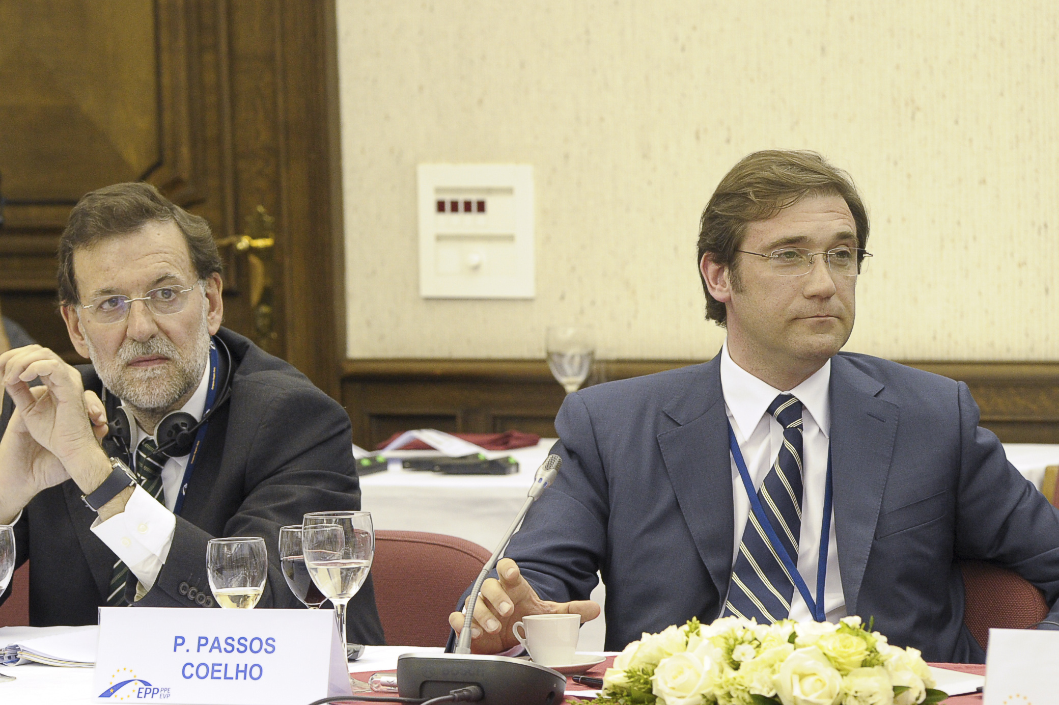 EPP Summit June 2010